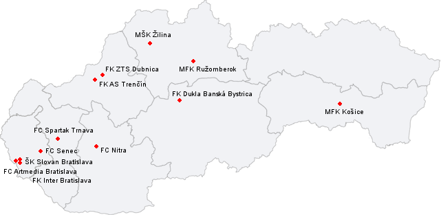 Mapa Corgoň ligy 2006/07